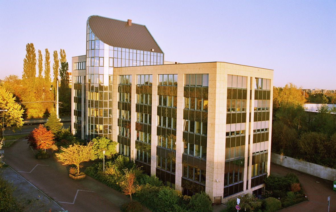 Studienkreis Unternehmenszentrale in Bochum, Deutschland